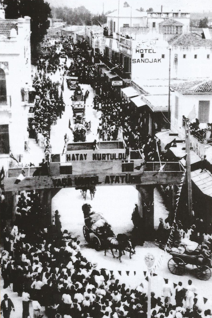 Şükrü Kanatlı komutasında İskenderun Sancağı'na giriş yapan Türk Ordusu.